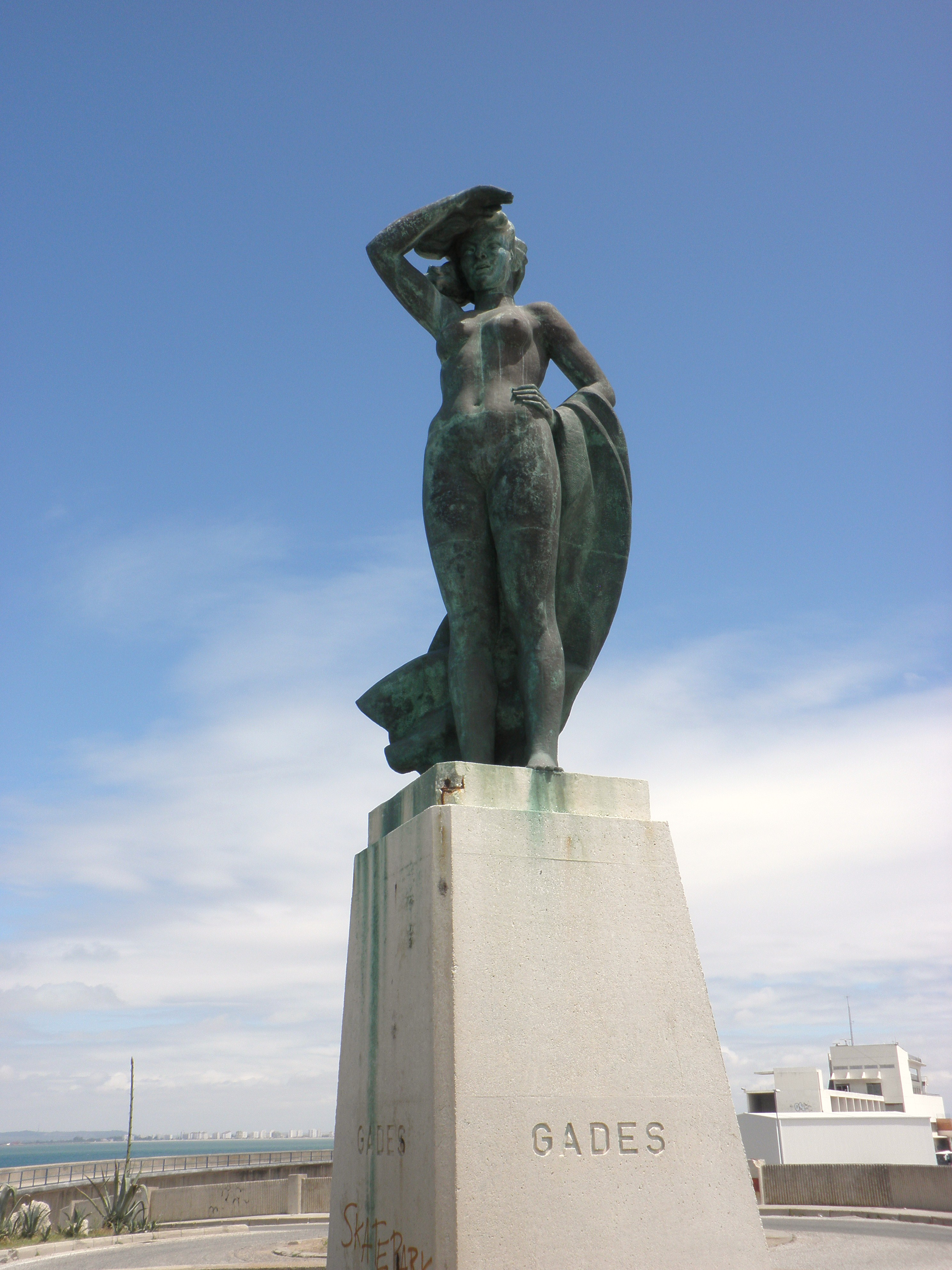 Estatua Gades, obra del escultor gaditano Juan Luis Vassallo Parodi en Cádiz, España.